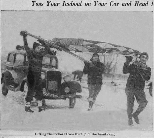 Cartopping the Blue Streak